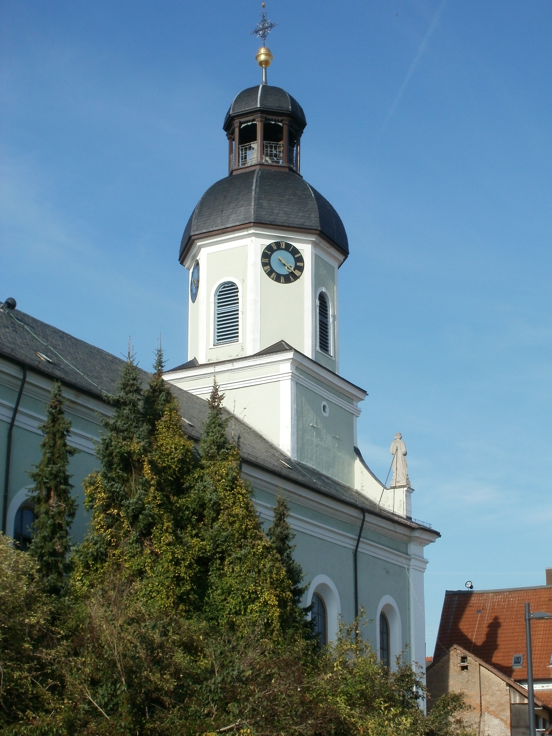 St. Maria (Philippsburg)